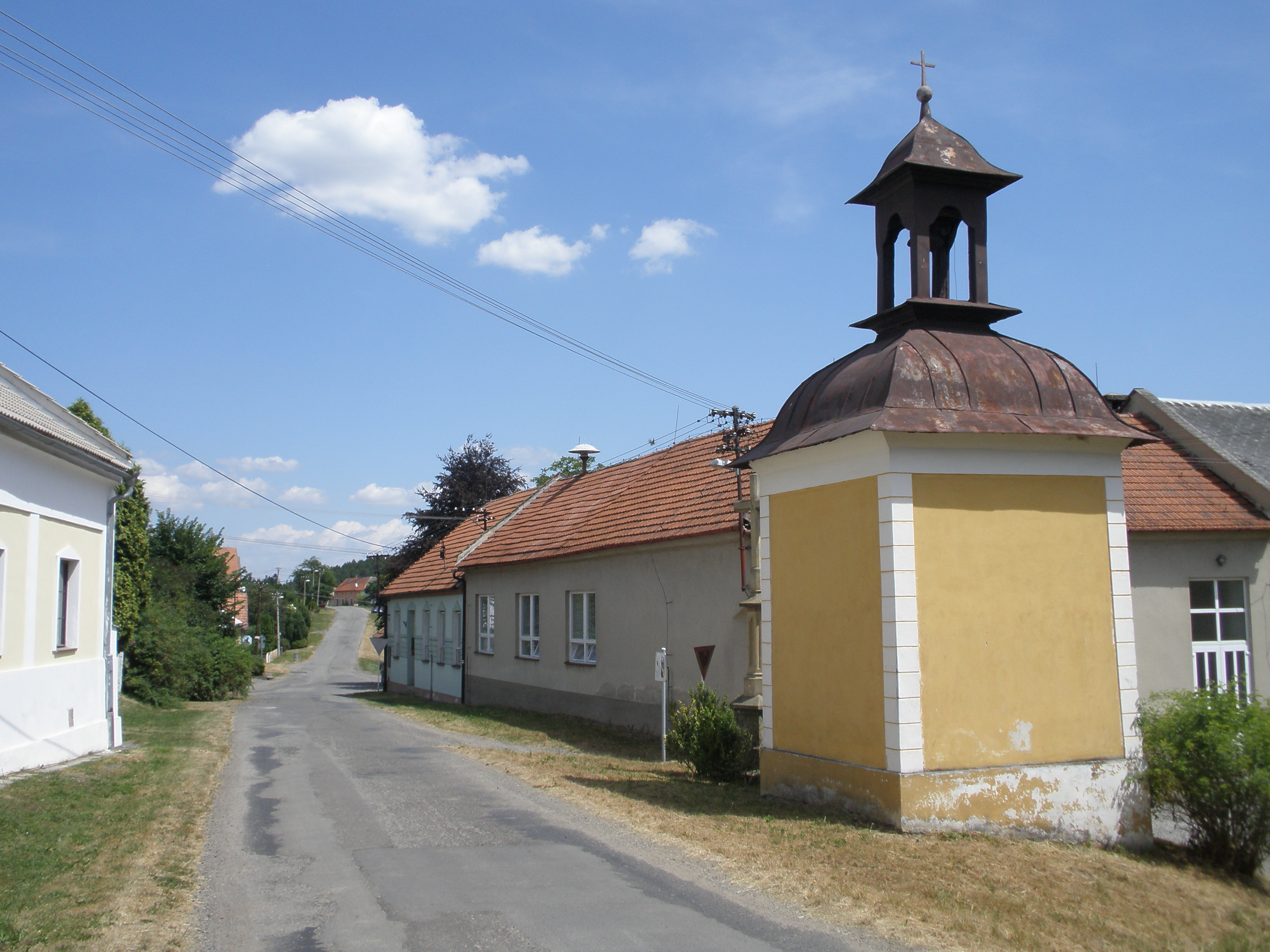 Kaple ve vesnici Velká Roudka, která je součástí města Velké Opatovice